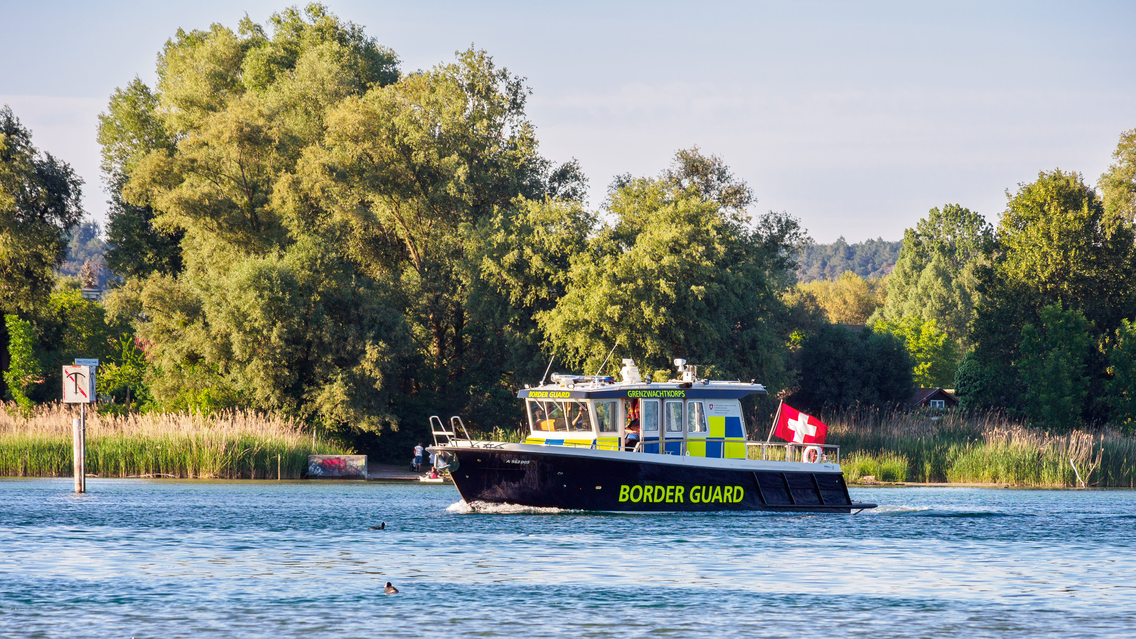 Grenzwachtboot patroulliert auf dem Seerhein, der Grenze zwischen CH-Tägerwilen und D-Konstanz.